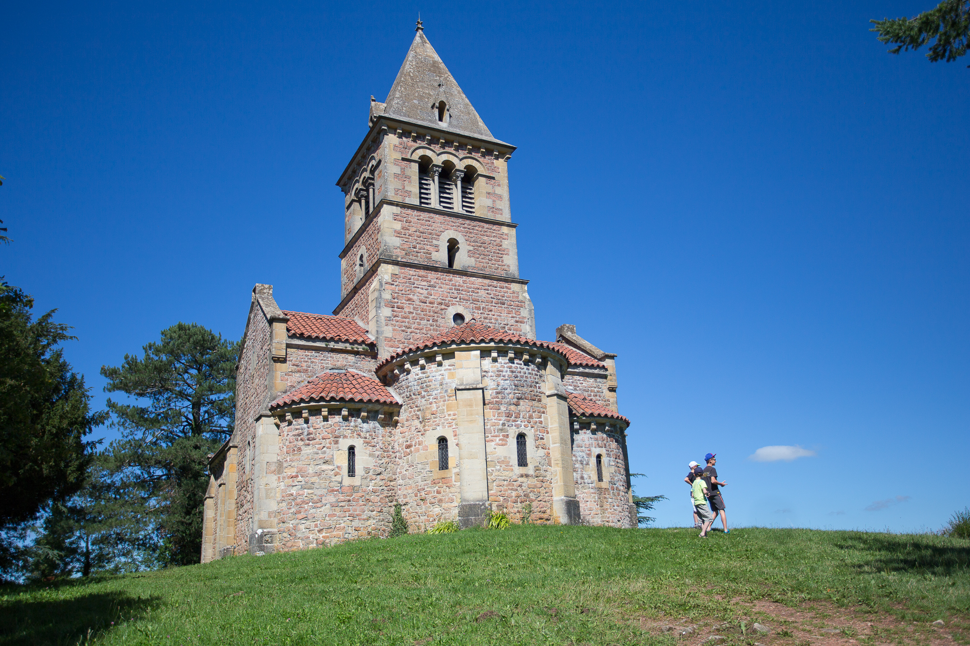 Chapelle De Dun